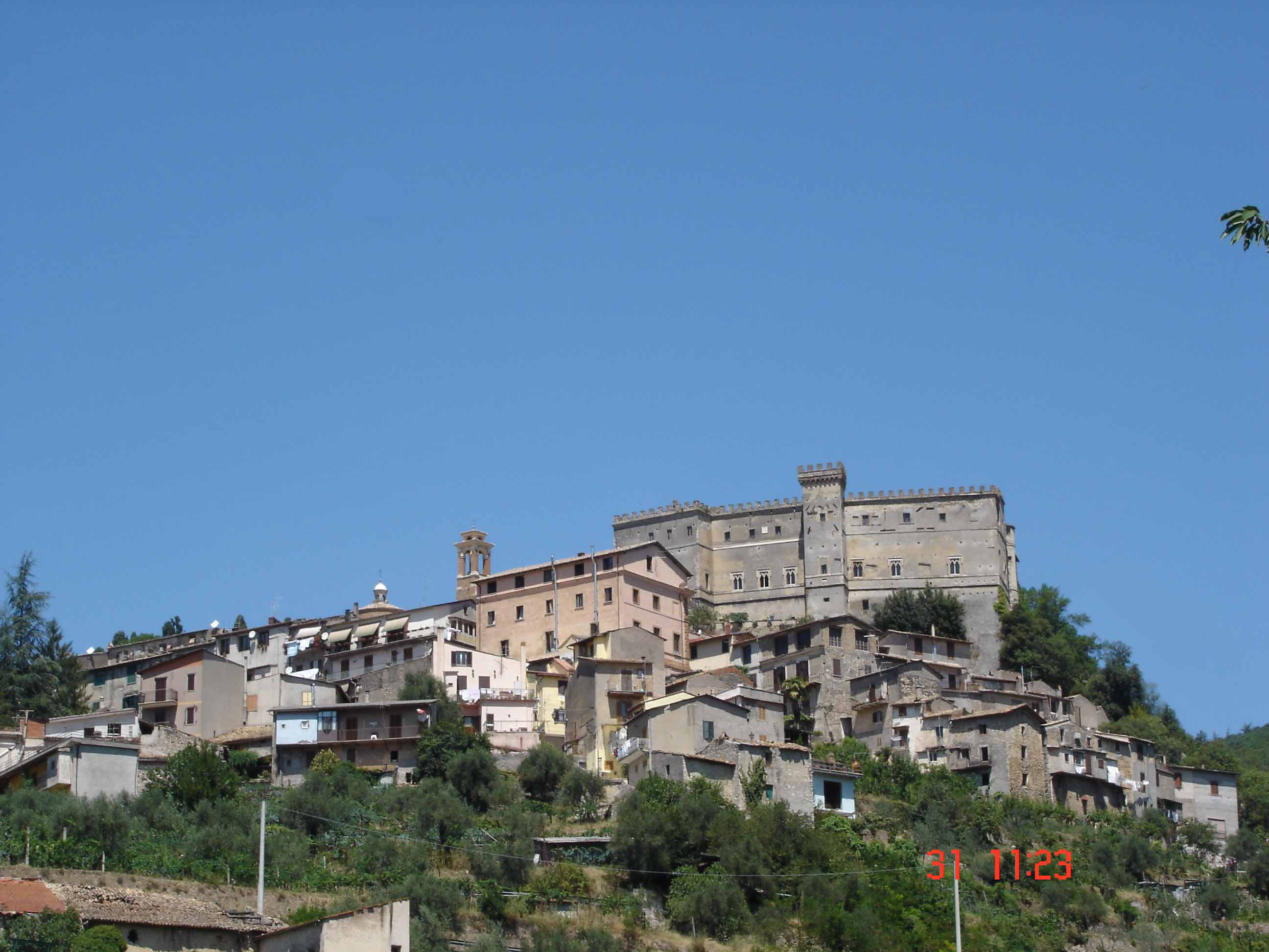 Foto personale scattata ad Agosto 2006 da